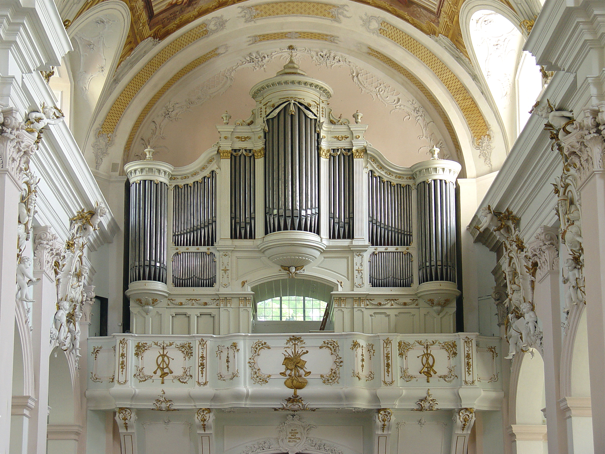 Orgel der Barockkirche Maria Immaculata in Büren